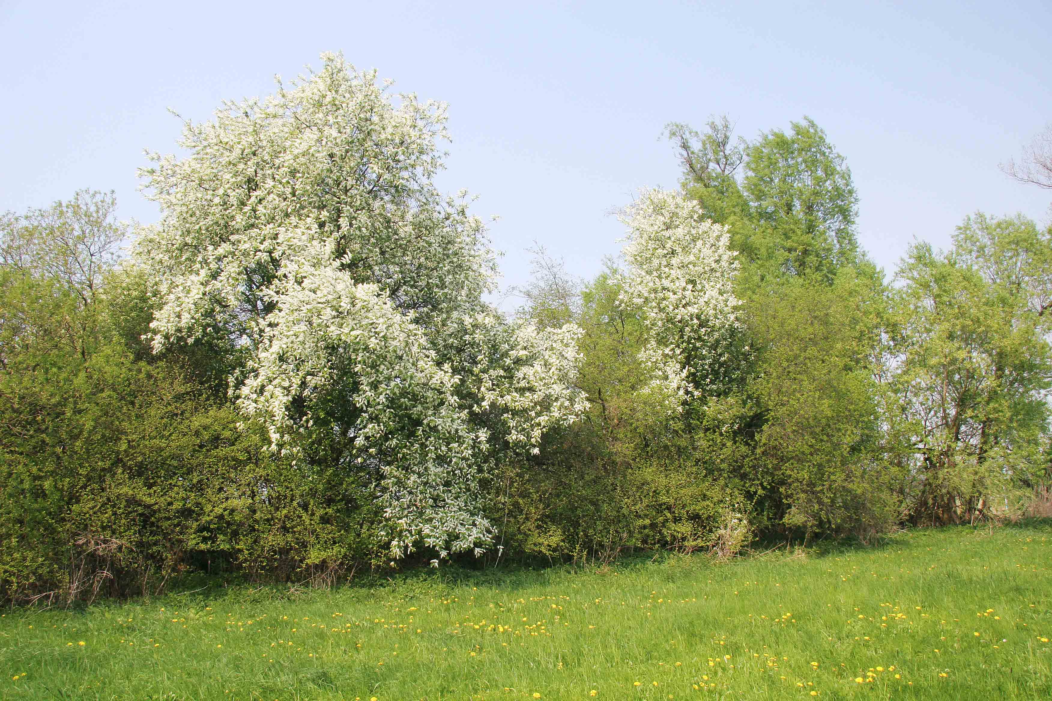 Prunus padus autor:Prazak